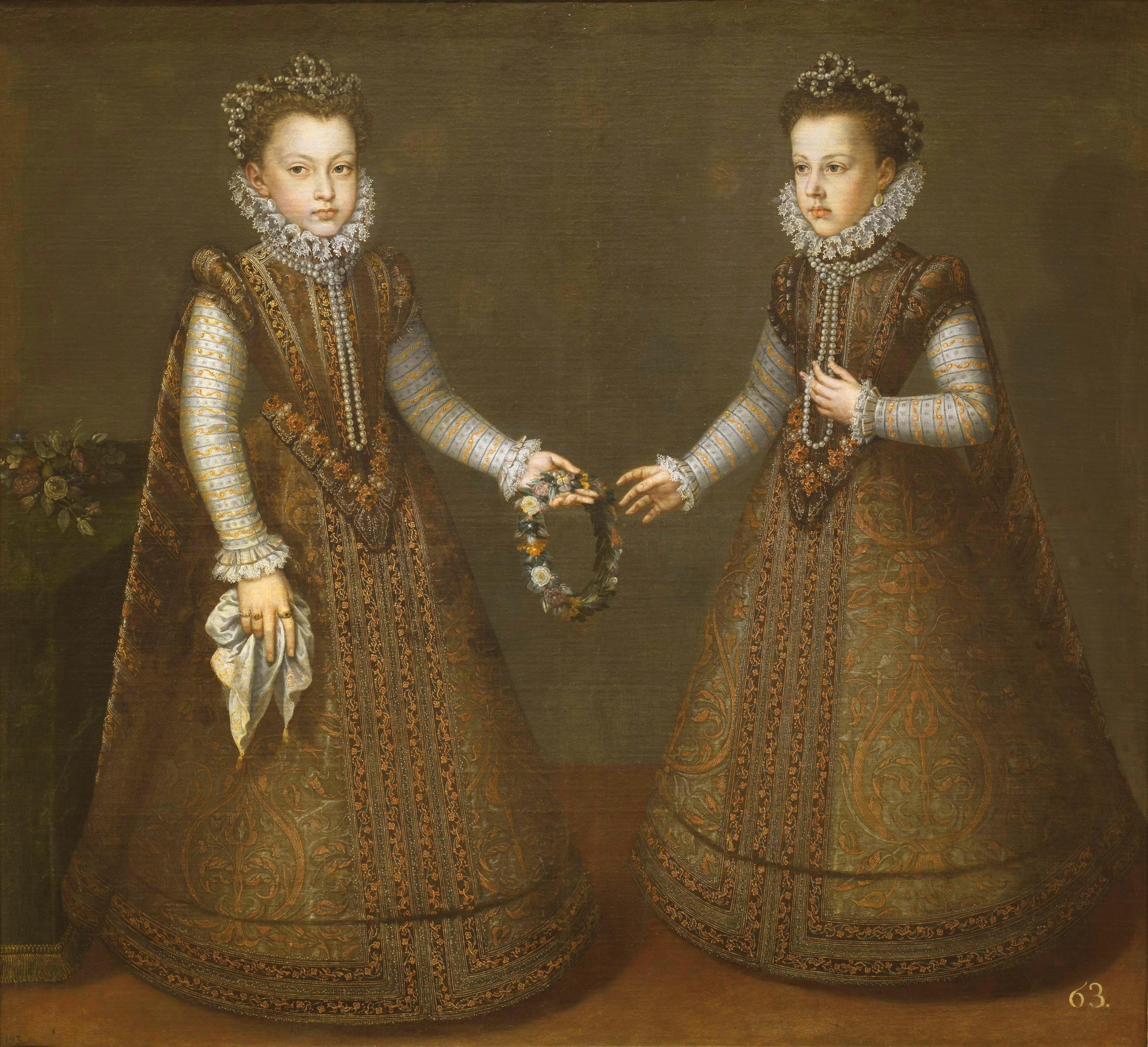 Retrato de las infantas Isabel Clara Eugenia (1566-1633), que fue hija del rey Felipe II de España y esposa del archiduque Alberto de Austria, y Catalina Micaela de Austria (1567-1597), que también fue hija del rey Felipe II y esposa del duque Carlos Manuel I de Saboya.